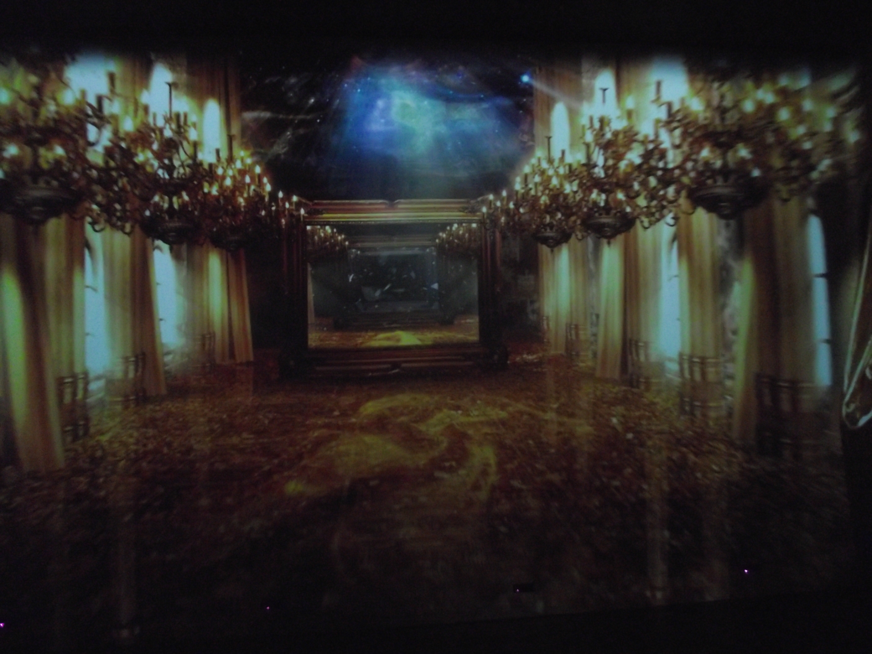 Le palais des saisons, spectacle visuel au Musée Grévin Montréal